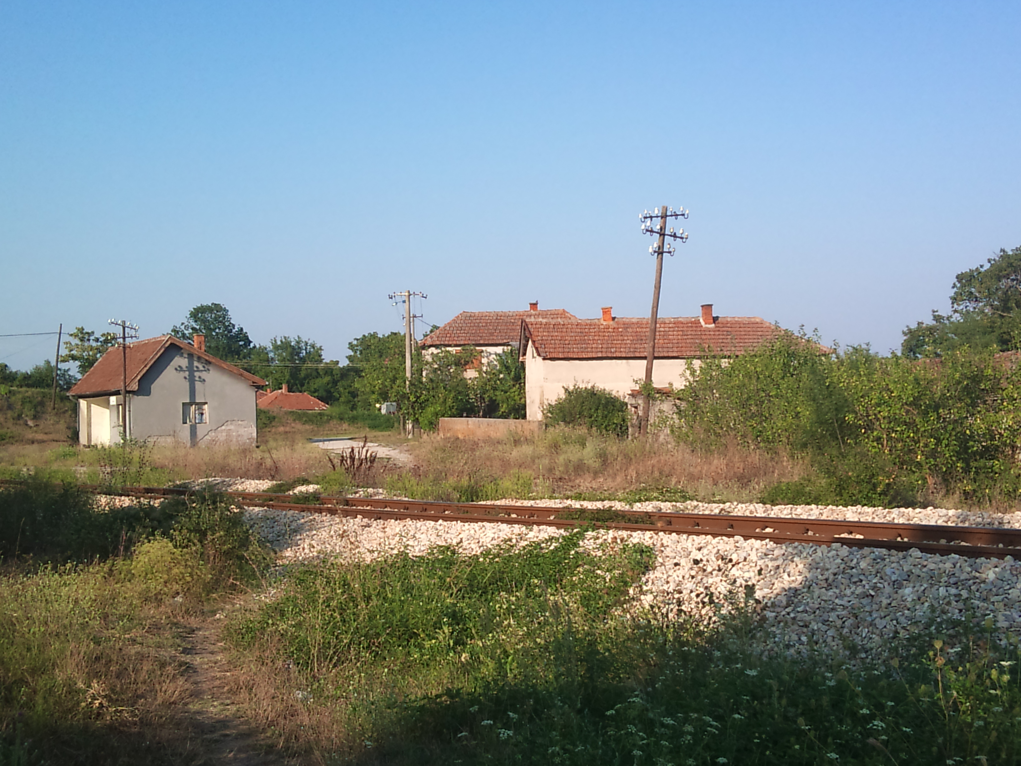 Pogled na jedan deo Gradca.